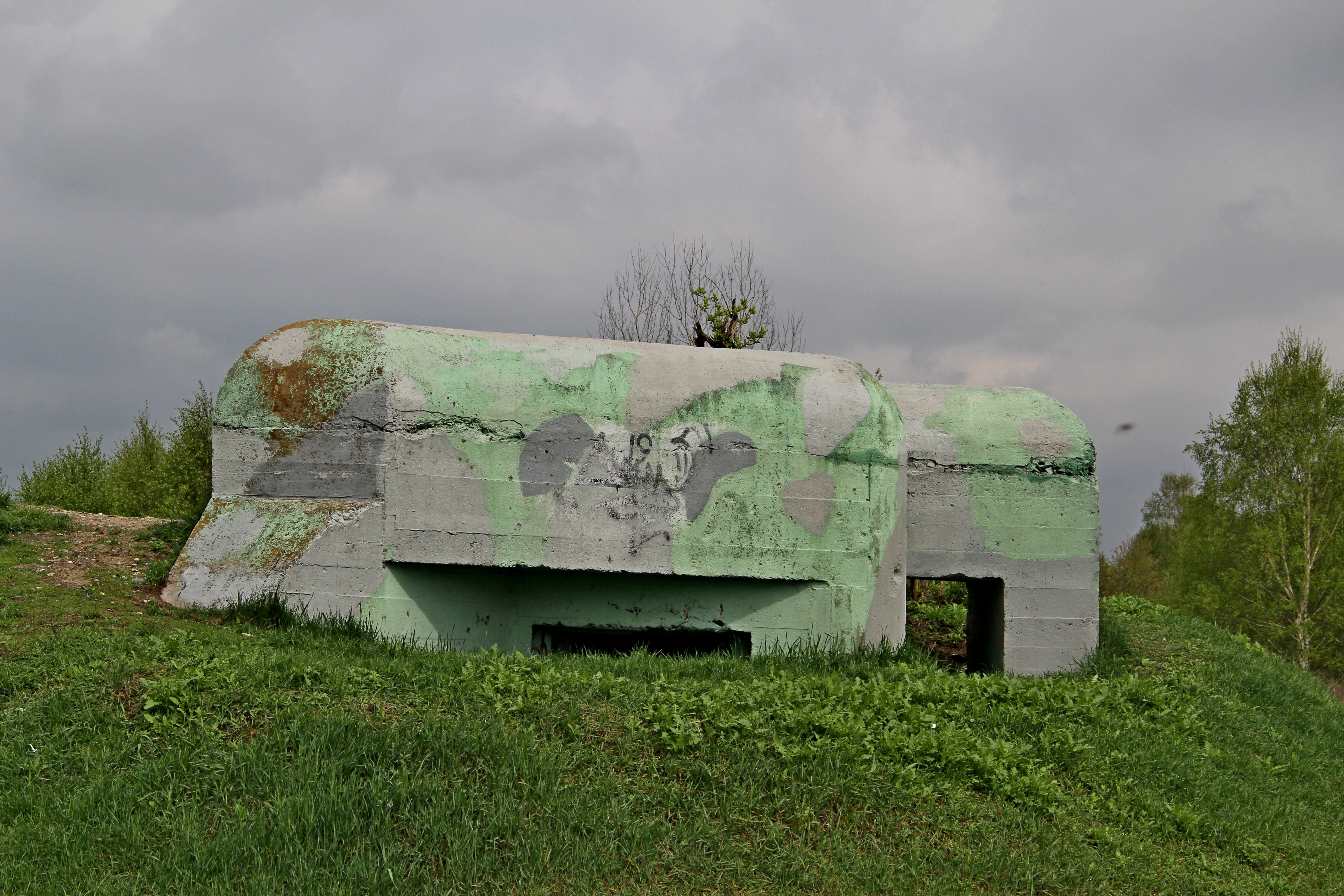 Polski schron bojowy 08 wybudowany w lipcu 1939 roku w ramach częstochowskiej reduty (składającej się z 19 bunkrów, znanyc jest 12), znajduje się przy ul. Radomskiej w Częstochowie. Jest to schron do ognia jednobocznego, lewostronny. Obiekt był obsadzony przez żołnierzy 2 kompanii ckm II batalionu 27 pp. 2 września brał udział w ciężkich walkach o wzgórze 296,6 (Liszka Górna). Schron nosi kilkadziesiąt śladów po trafieniach pociskami i odłamkami różnego kalibru.